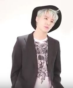 씬플레이빌 7월호 김준수 화보촬영